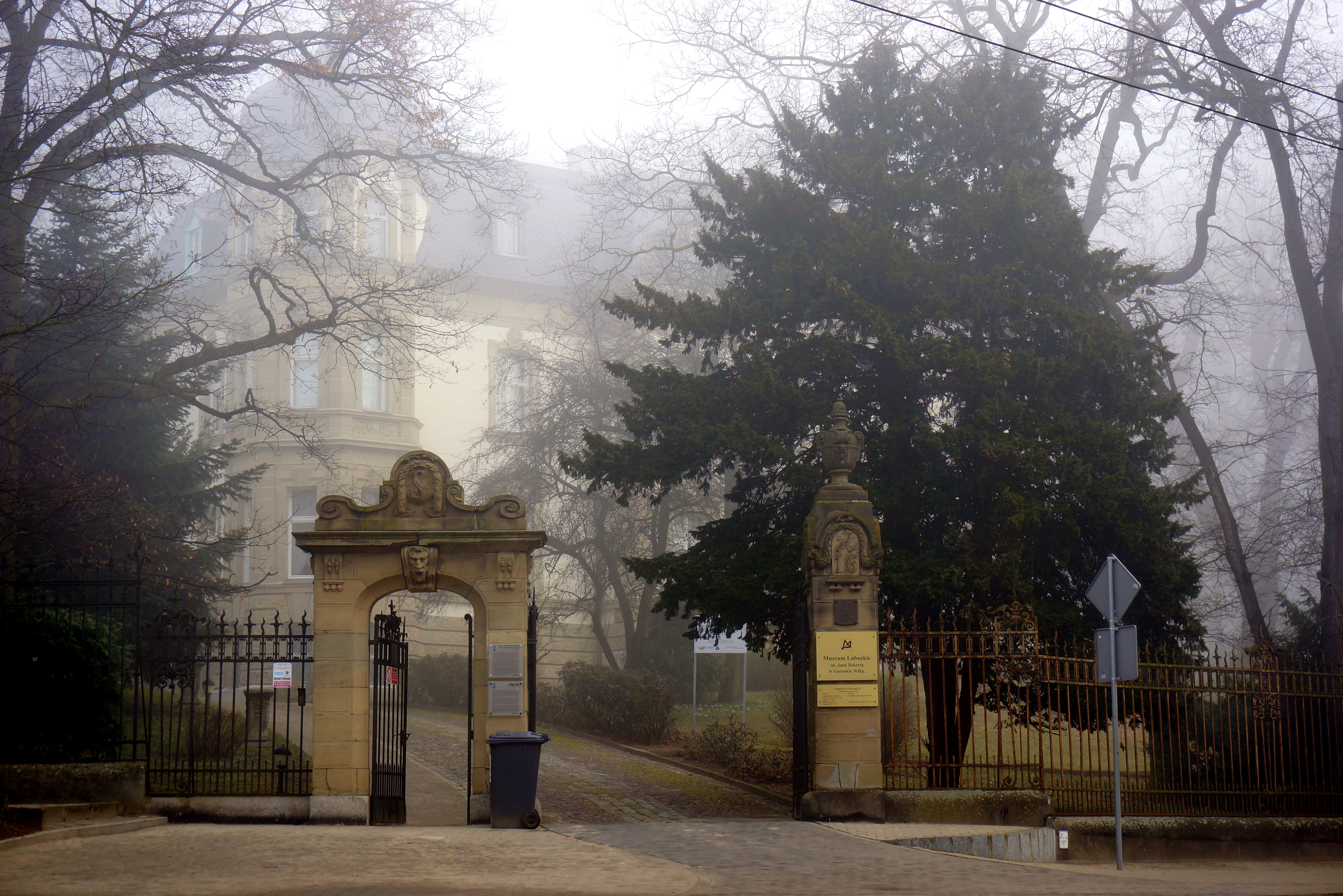 Gorzów Wielkopolski, ogrodzenie